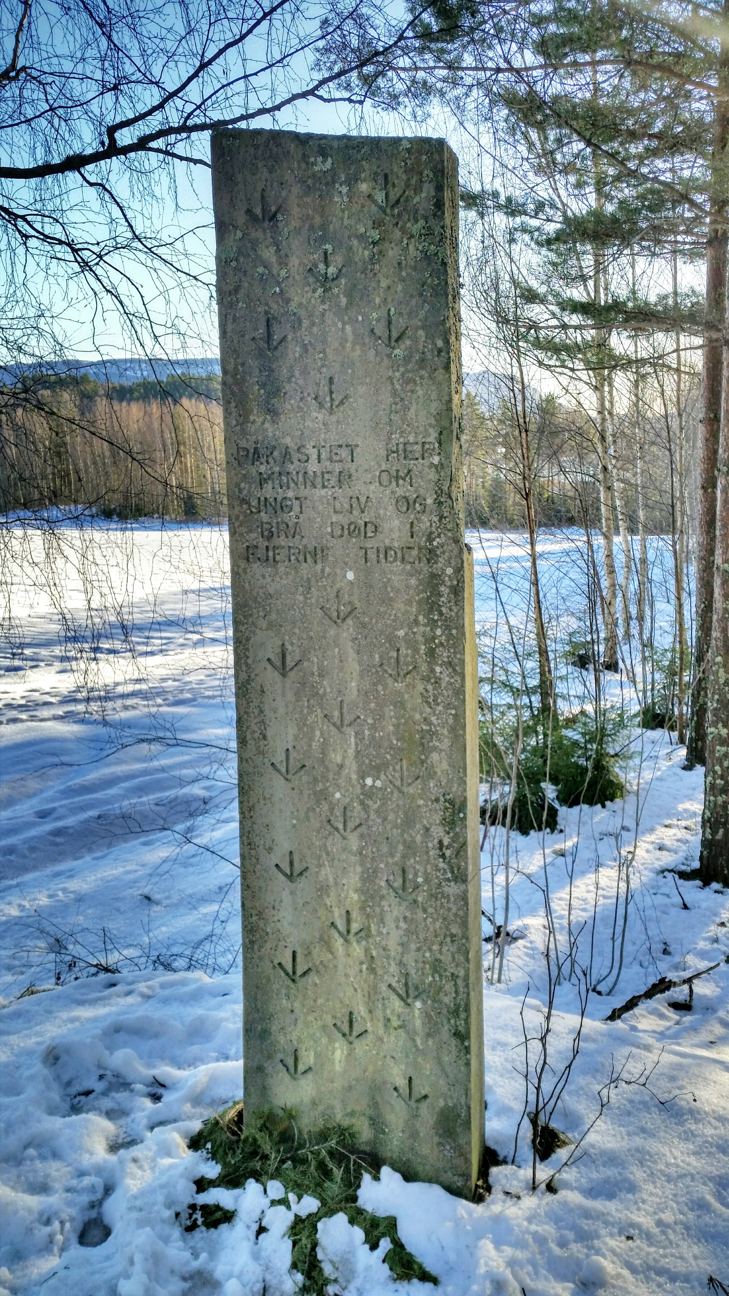 Ulvestøtta står langs Røyseveien, ved Kastebakken i Hole kommune, Buskerud, Norge.